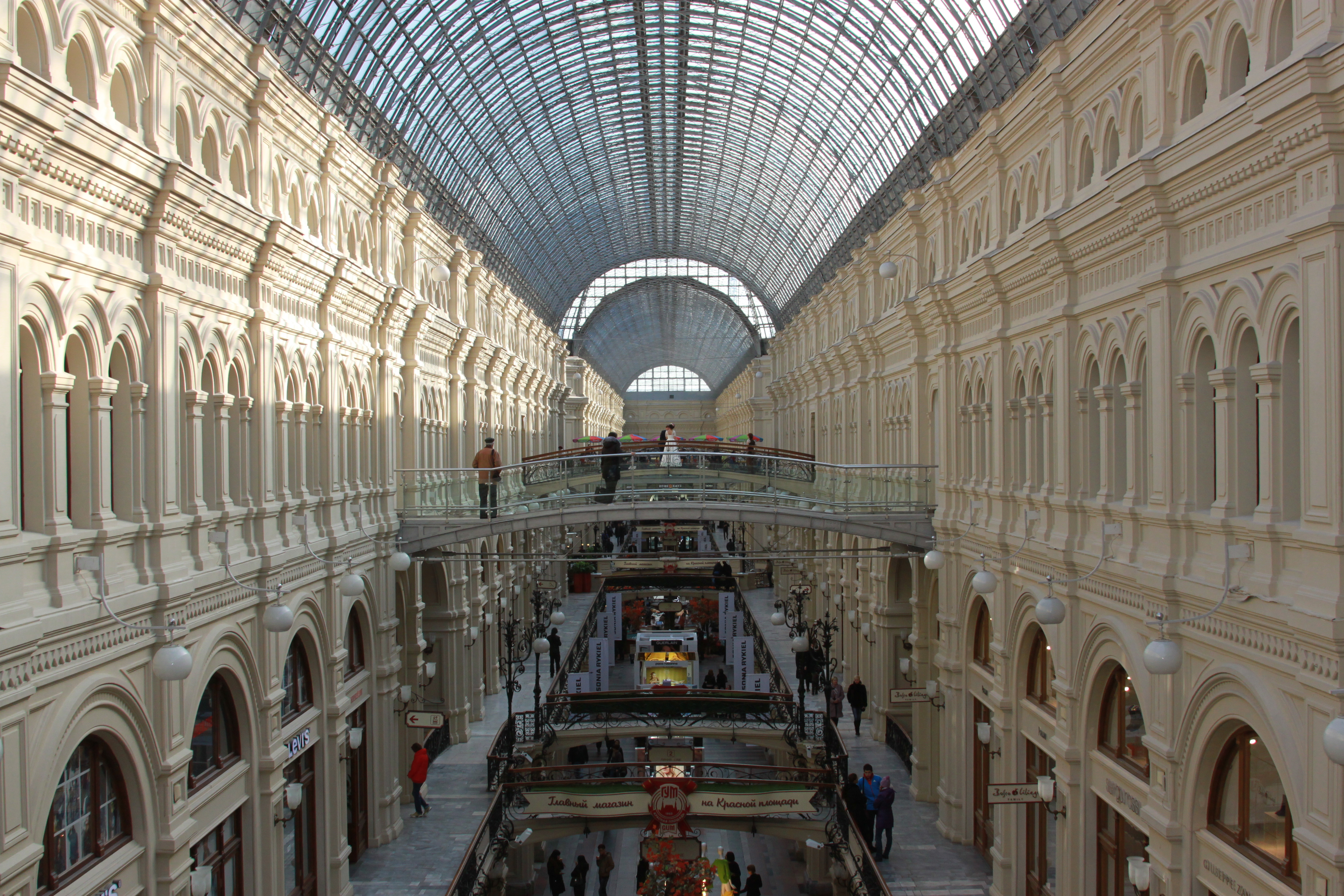 2014 Moscow GUM inside Москва внутри ГУМа